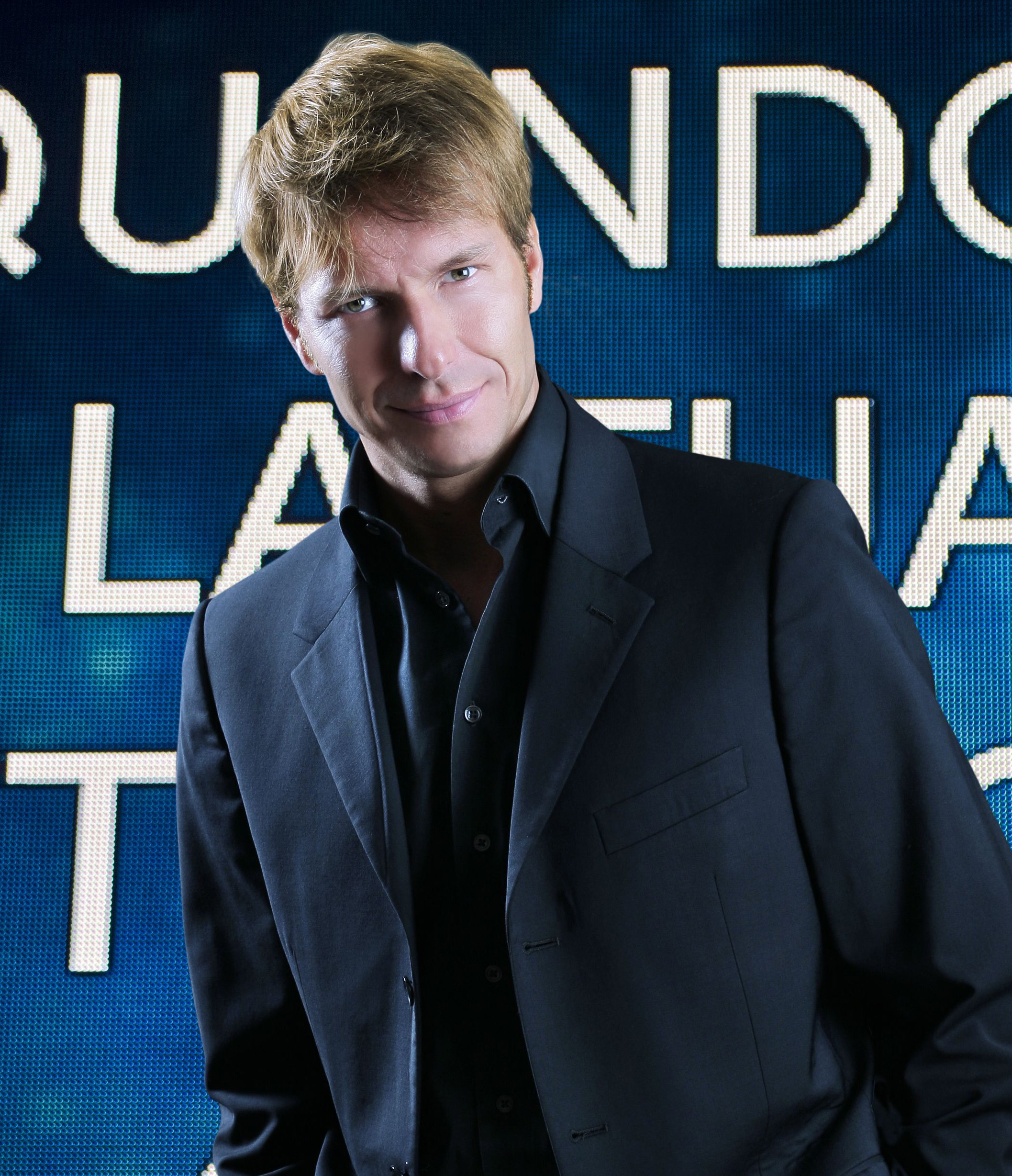 Walter Rolfo